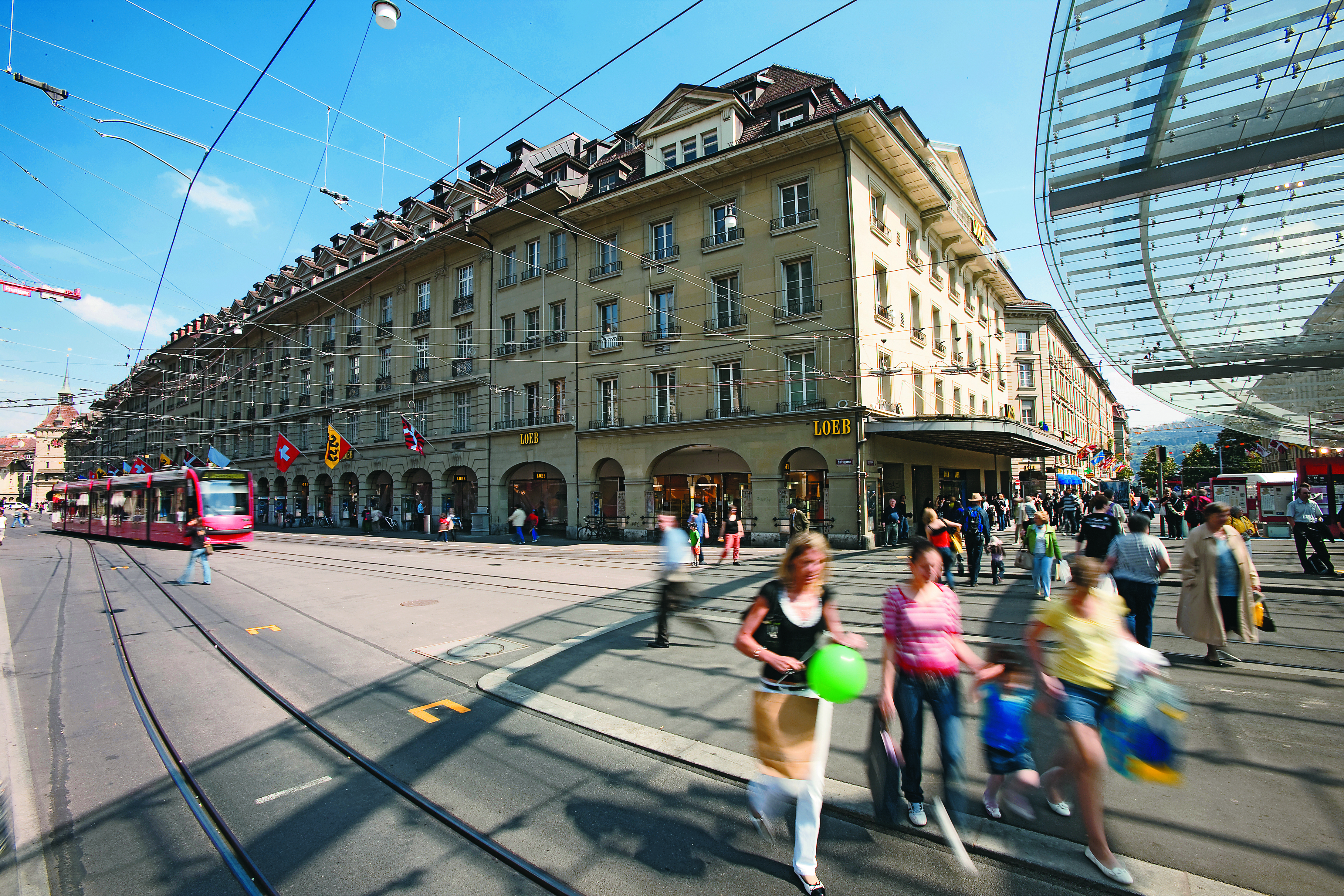 Das Warenhaus Loeb in Bern